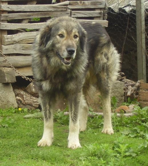 A Šarplaninac.